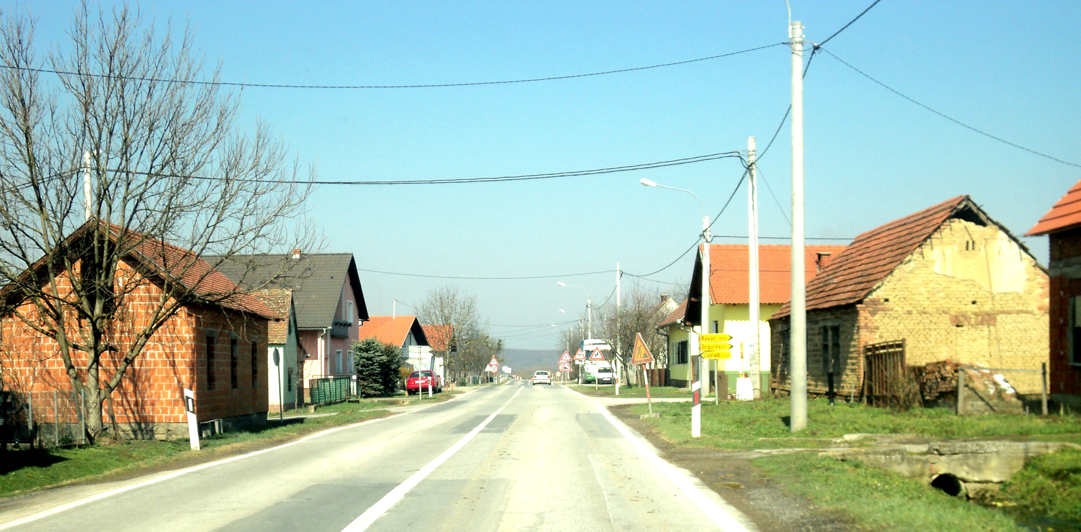 Bilice kod Pleternice